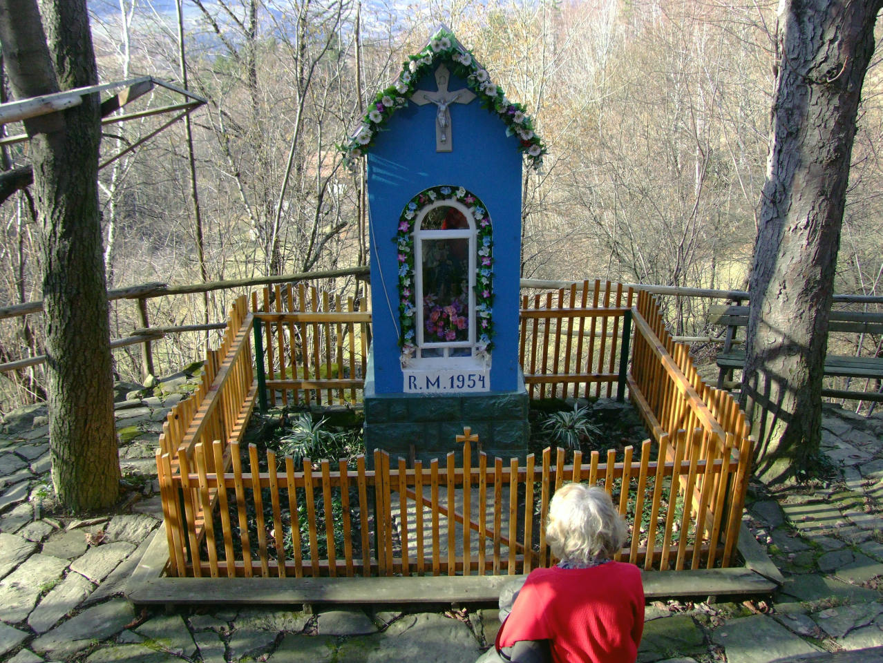 Laskowa (województwo małopolskie). Kapliczka na zboczach Sałasza.